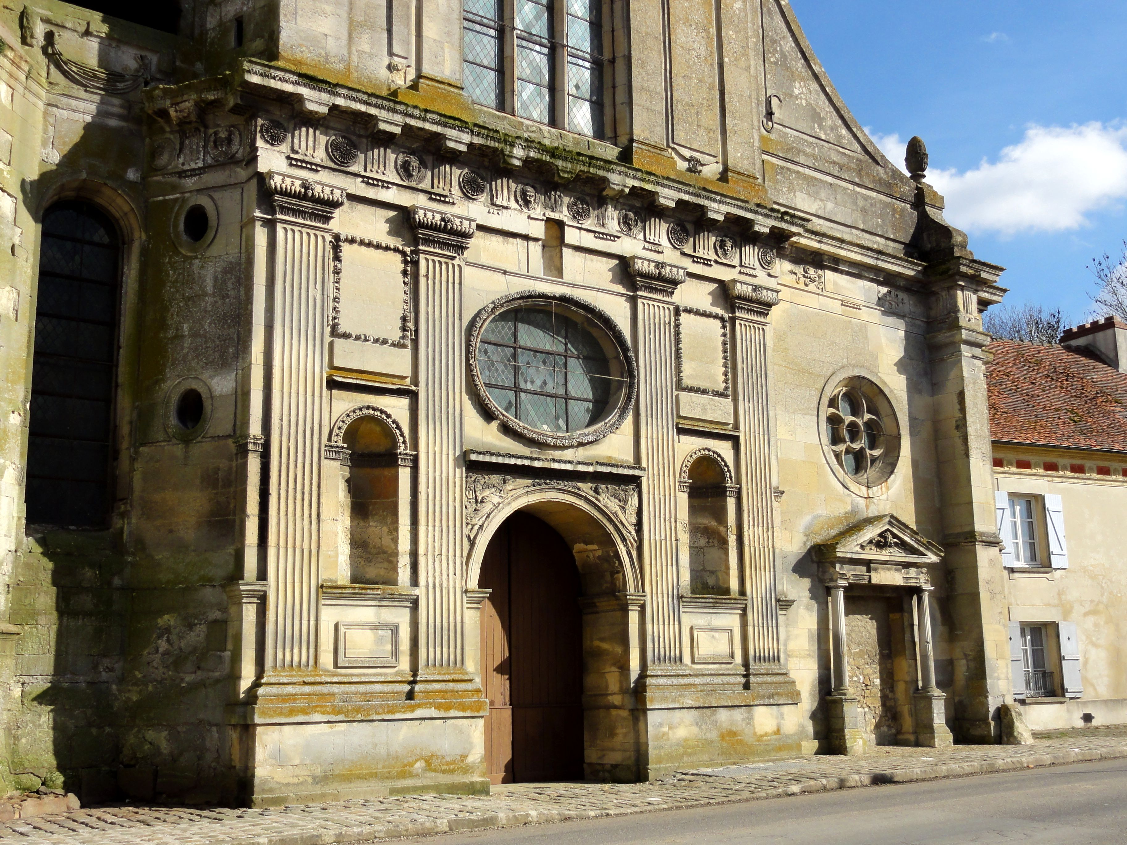 Façade occidentale, registre inférieur de 1554-60 environ.